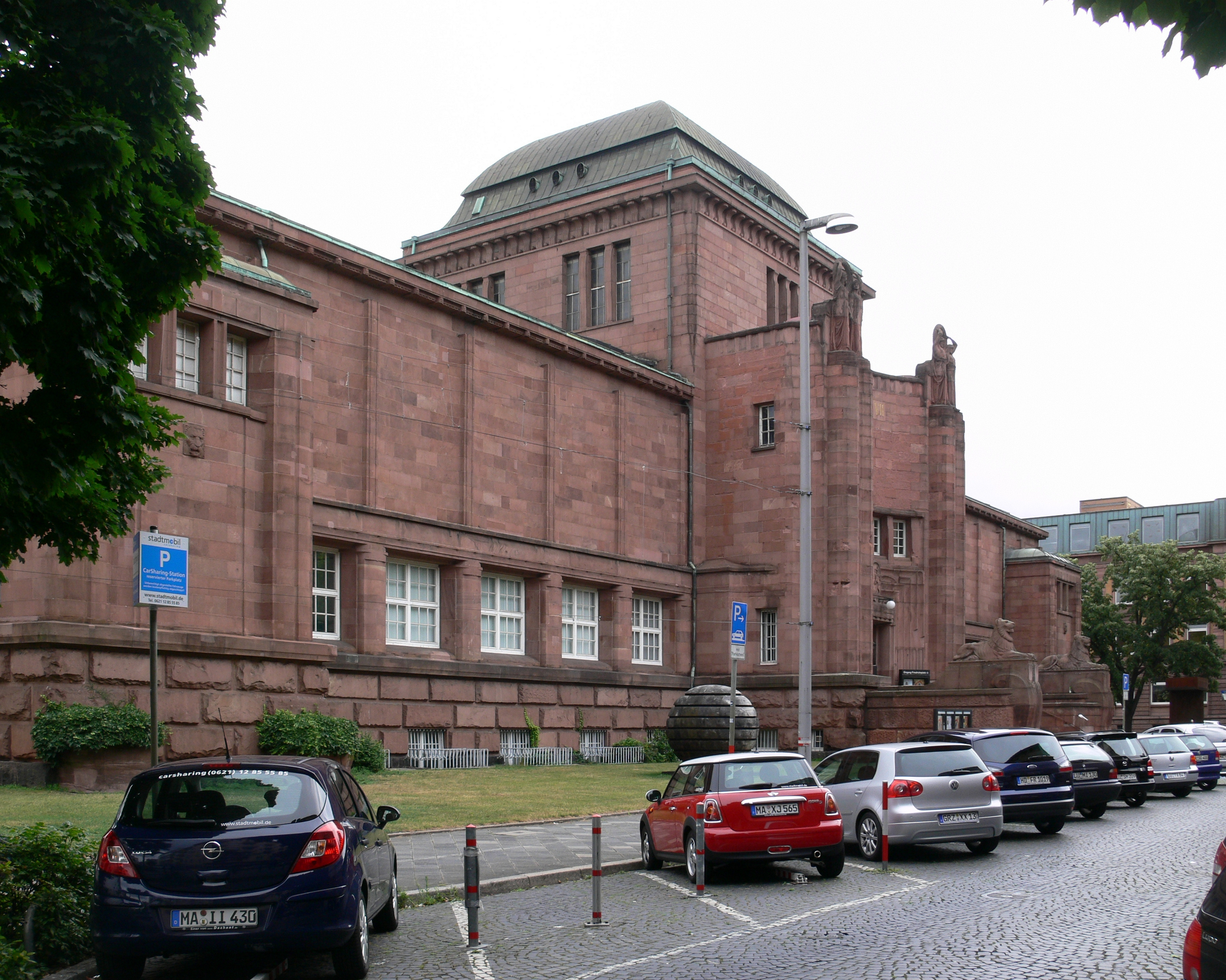 Kunsthalle Mannheim, Außenansicht